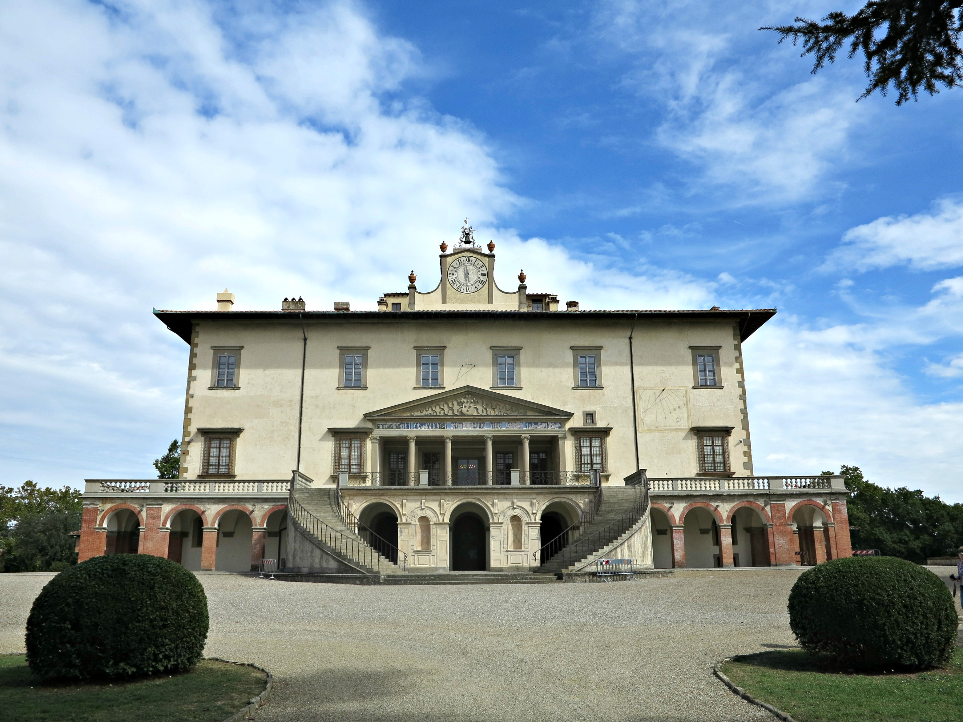 Villa medicea di Poggio a Caiano - MIBAC This is a photo of a monument which is part of cultural heritage of Italy.